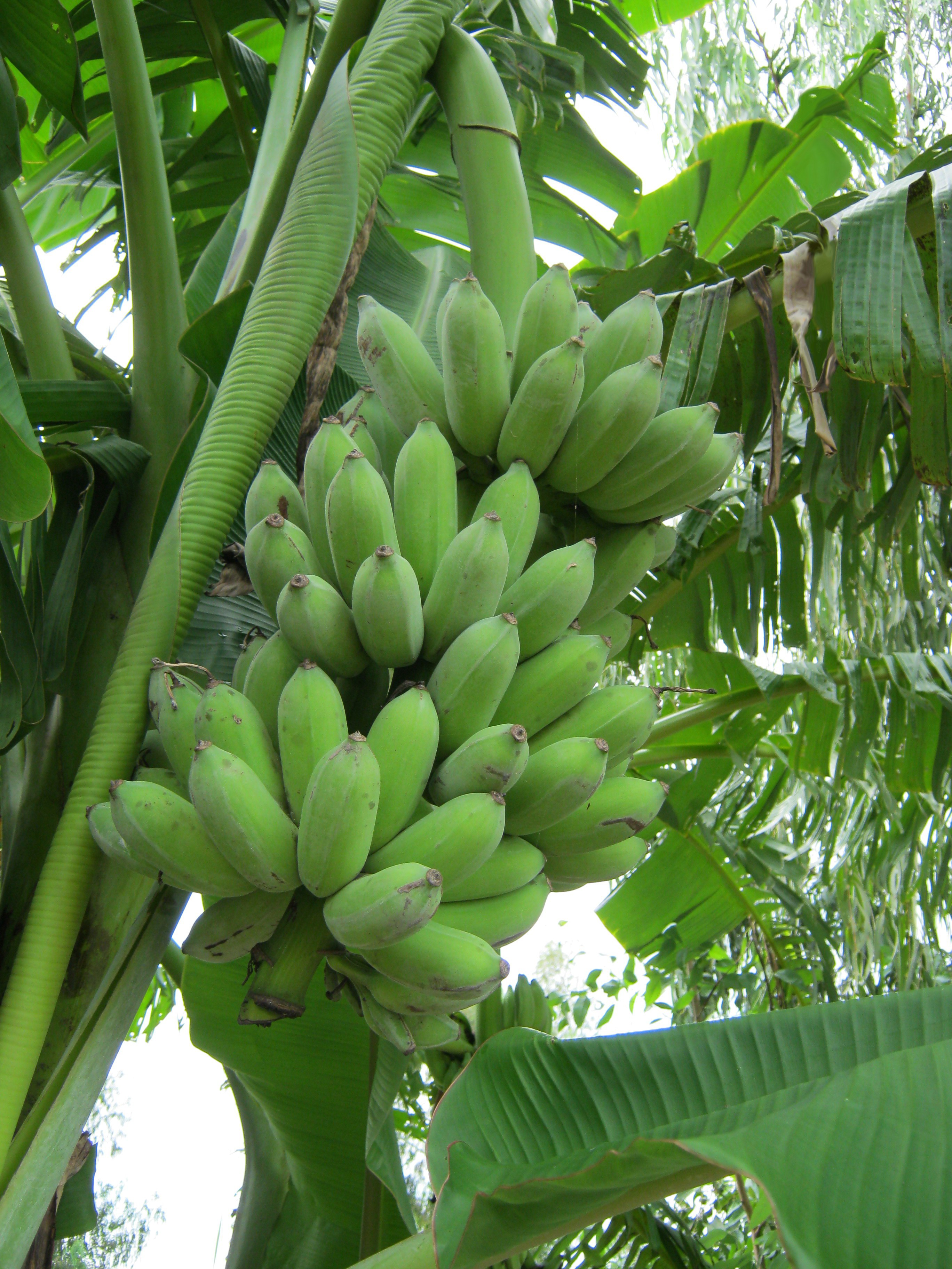 Một buồng chuối xiêm tại Thoại Sơn (An Giang, Việt Nam)